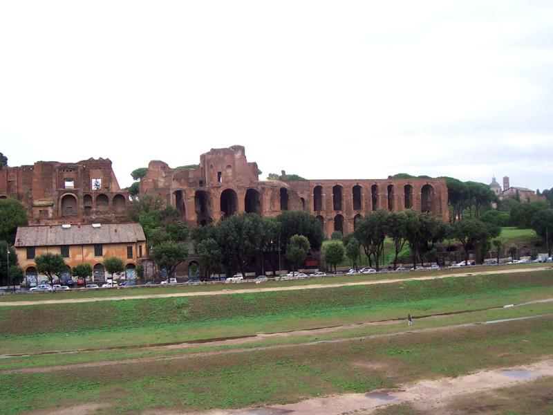 Roma - Palatino